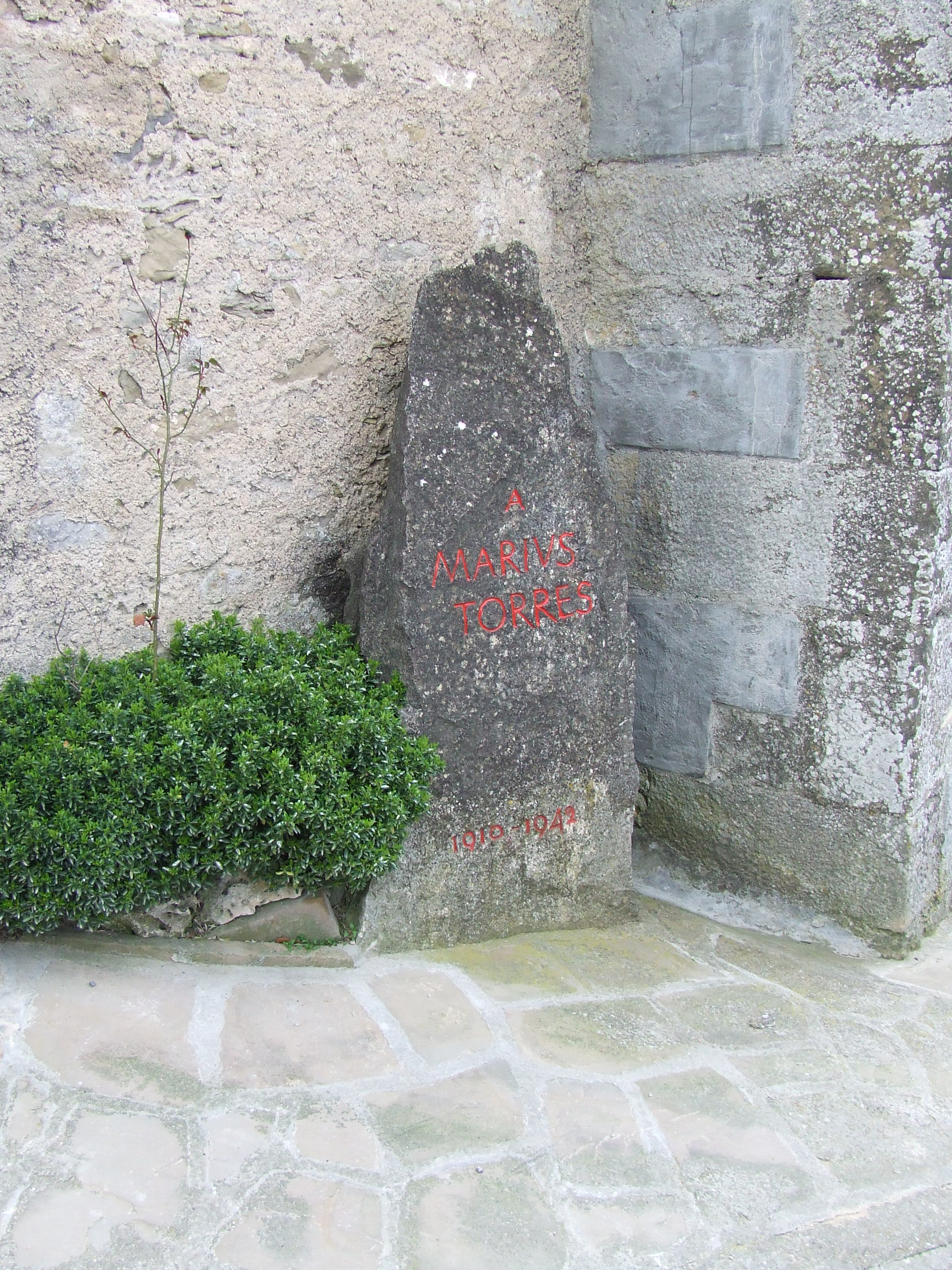 Sant Quirze Safaja, Moianès. Record de Màrius Torres